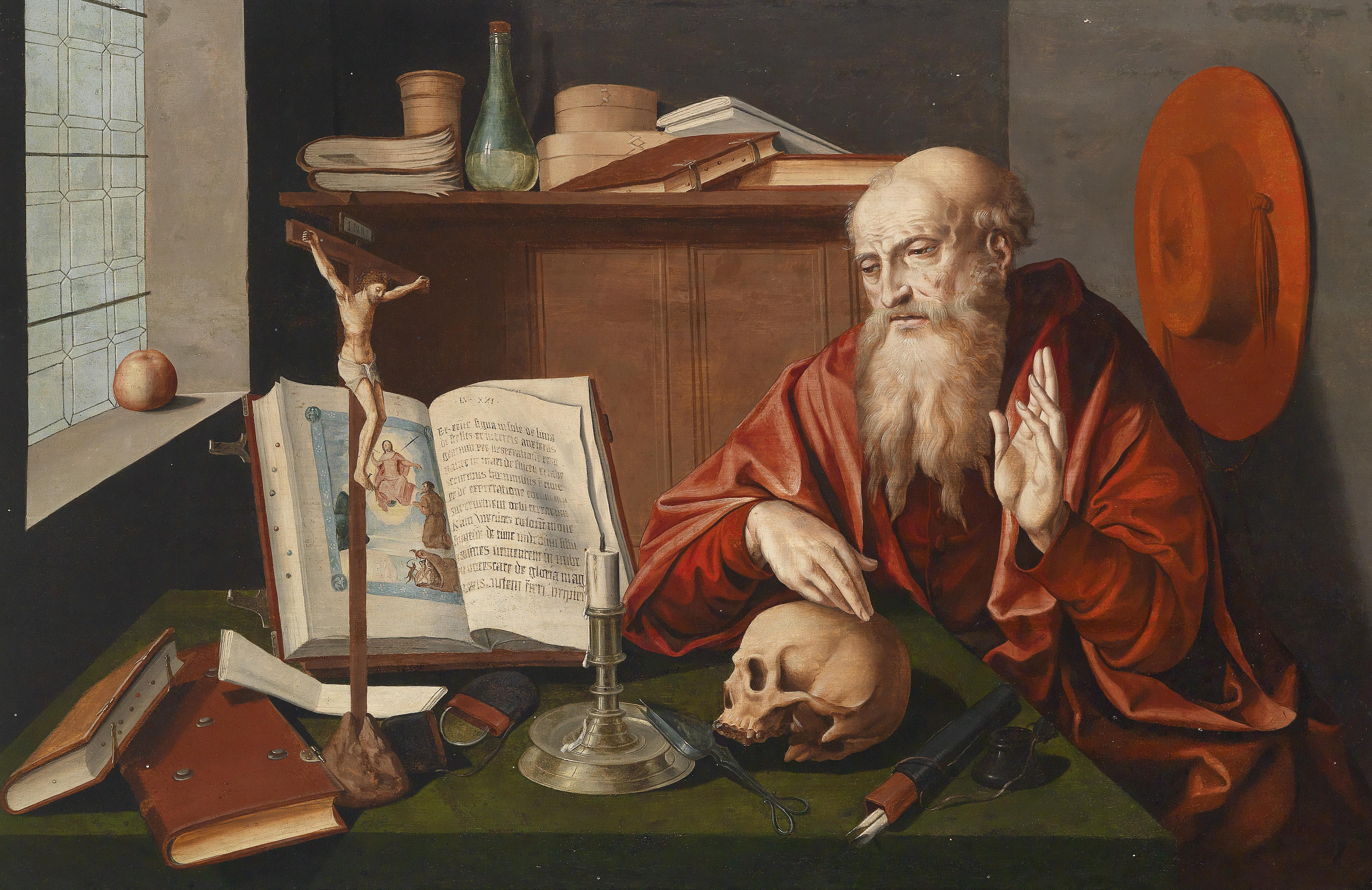 Der heilige Hieronymus in seinem Studierzimmer, Öl auf Holz, 76 x 116 cm